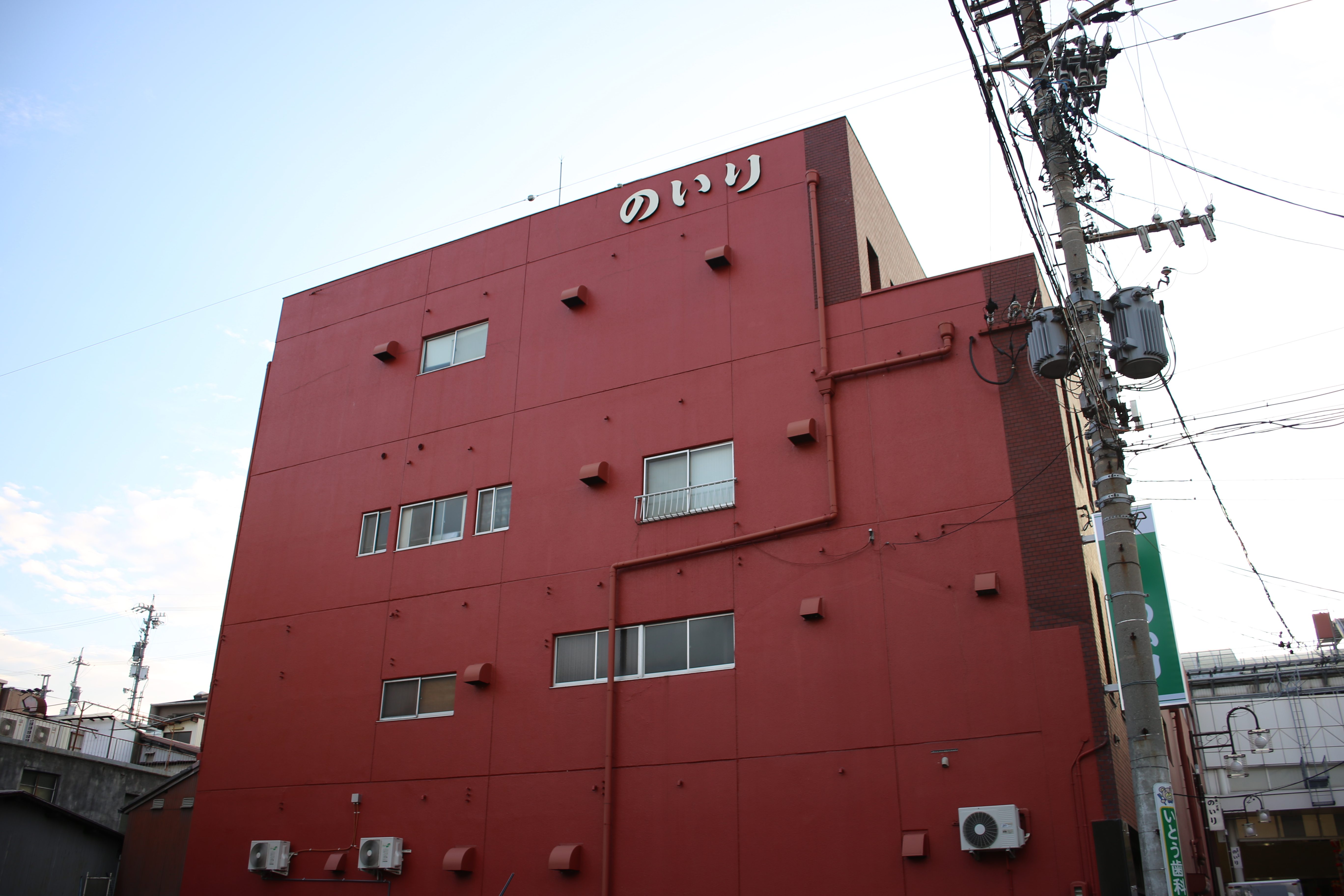 愛知県一宮市本町三丁目に所在するのいり本社を北側公道東側より撮影